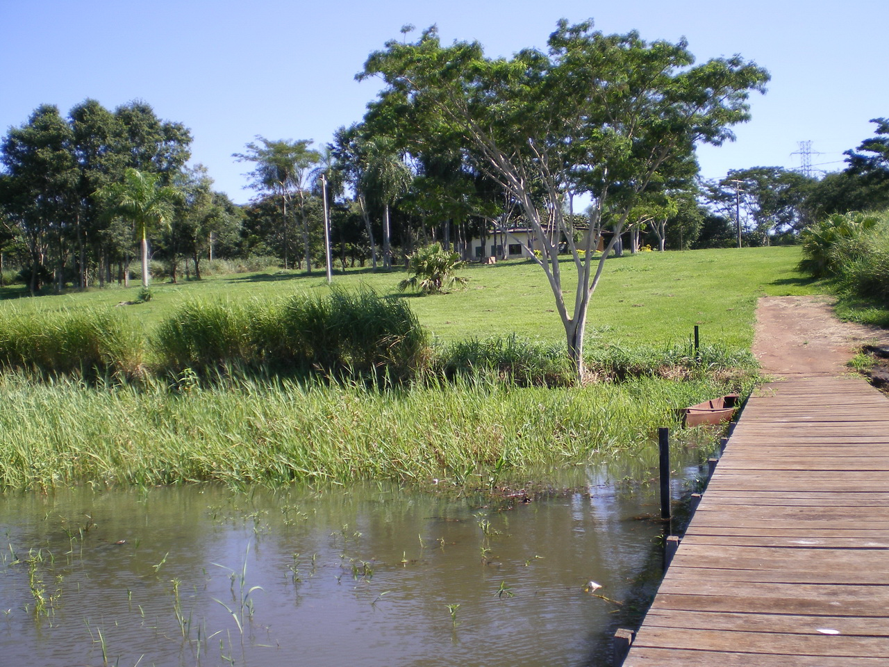 Fotos de los refugios y reservas de Itaipu, tomadas en los años 2007 y 2008 por mí